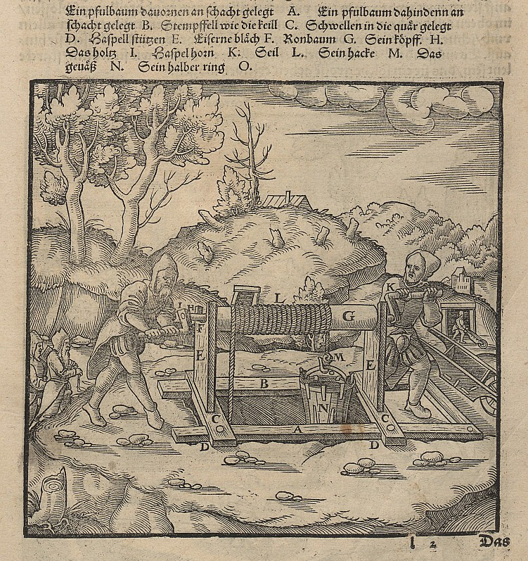 Original image description from the Deutsche Fotothek Bergwerk & Bergbau & Haspel